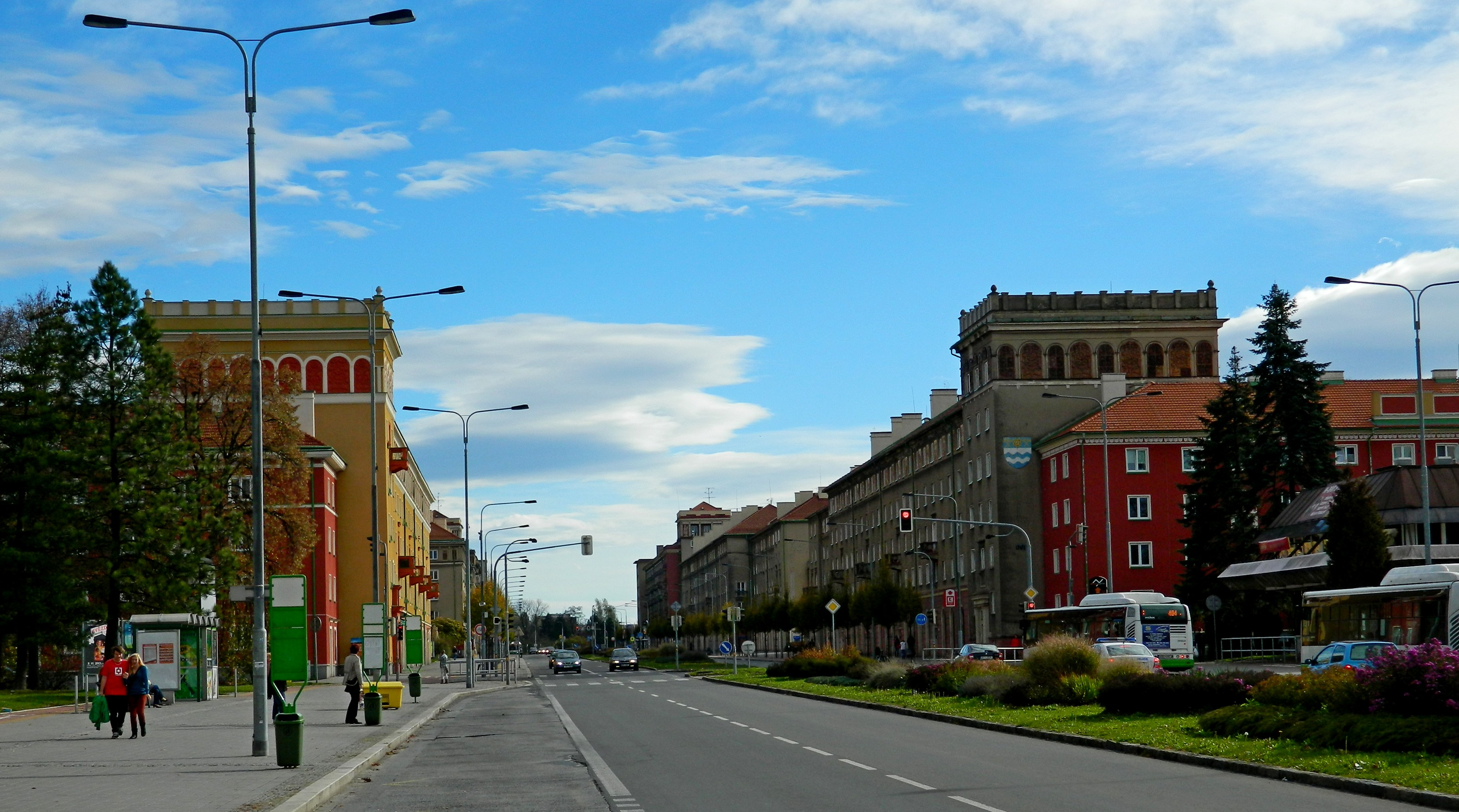 Široký bulvár s architekturou vystavěnou ve stylu socialistického realismu, tzv. sorela.